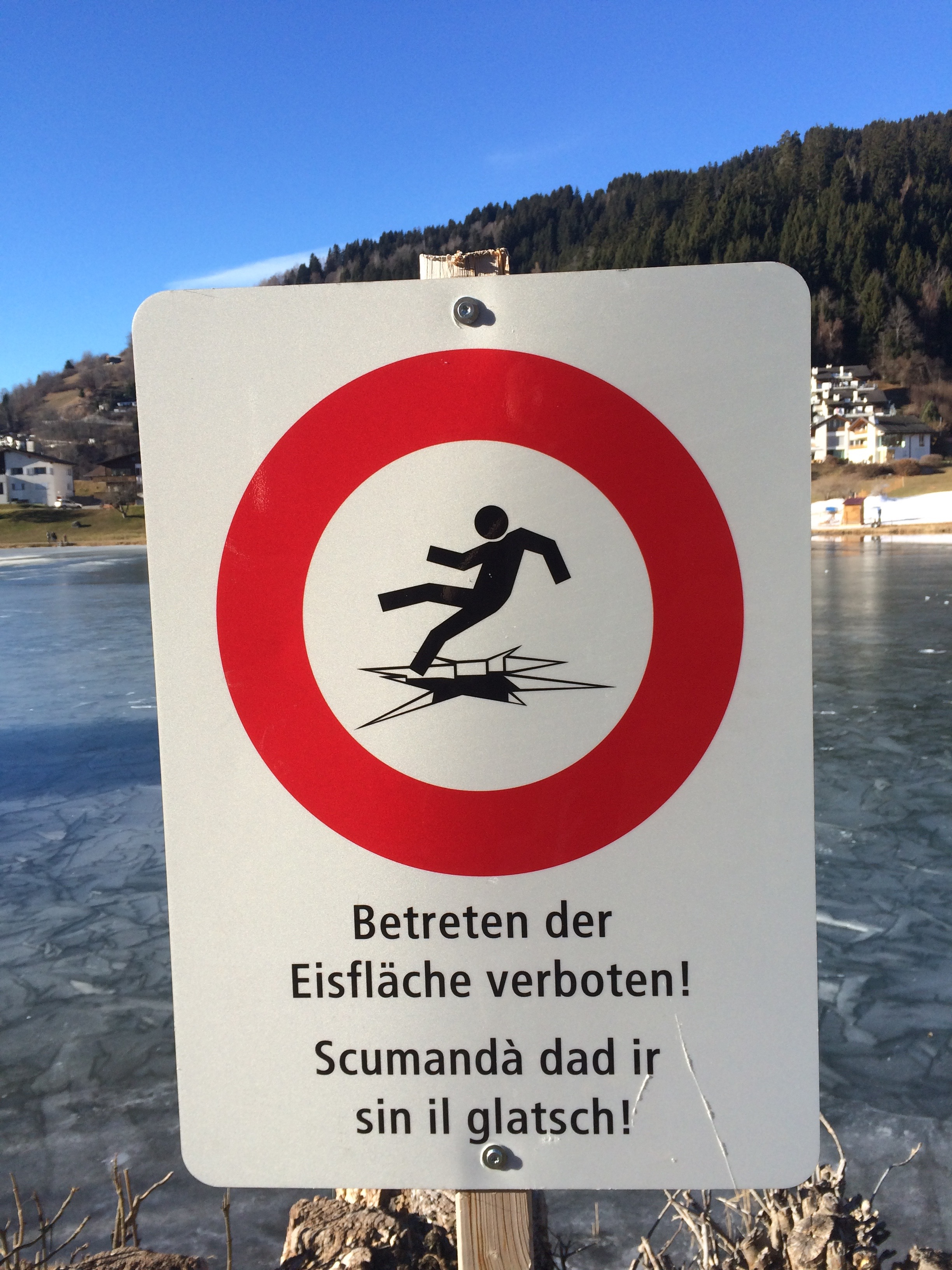 Zweisprachiges Schild am Laaxersee